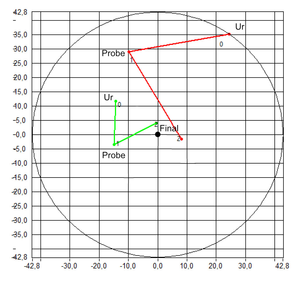 Verlauf der Schwingvektoren zweier Messstellen beim Betriebswuchten: 1. Urunwucht 2. Probegewicht 3. Ausgleich. Man nähert sich immer mehr dem 0-Punkt an.